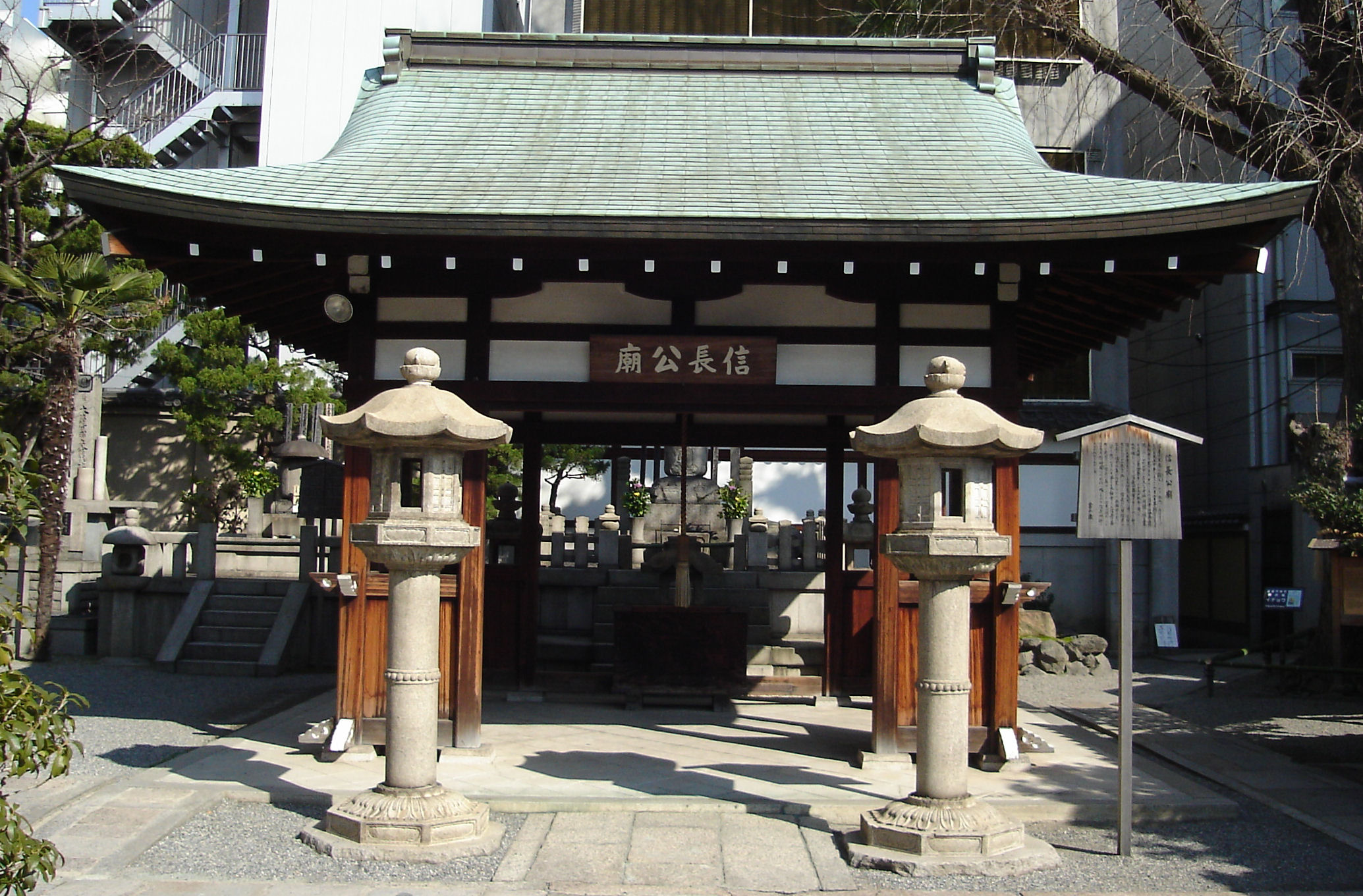 織田信長廟（京都本能寺）